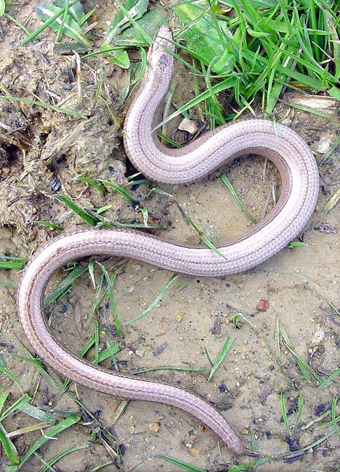 Orvet photographié sur le Plateau d'helfaut (réserve naturelle régionale) dans le nord de la France, près de Saint Omer.